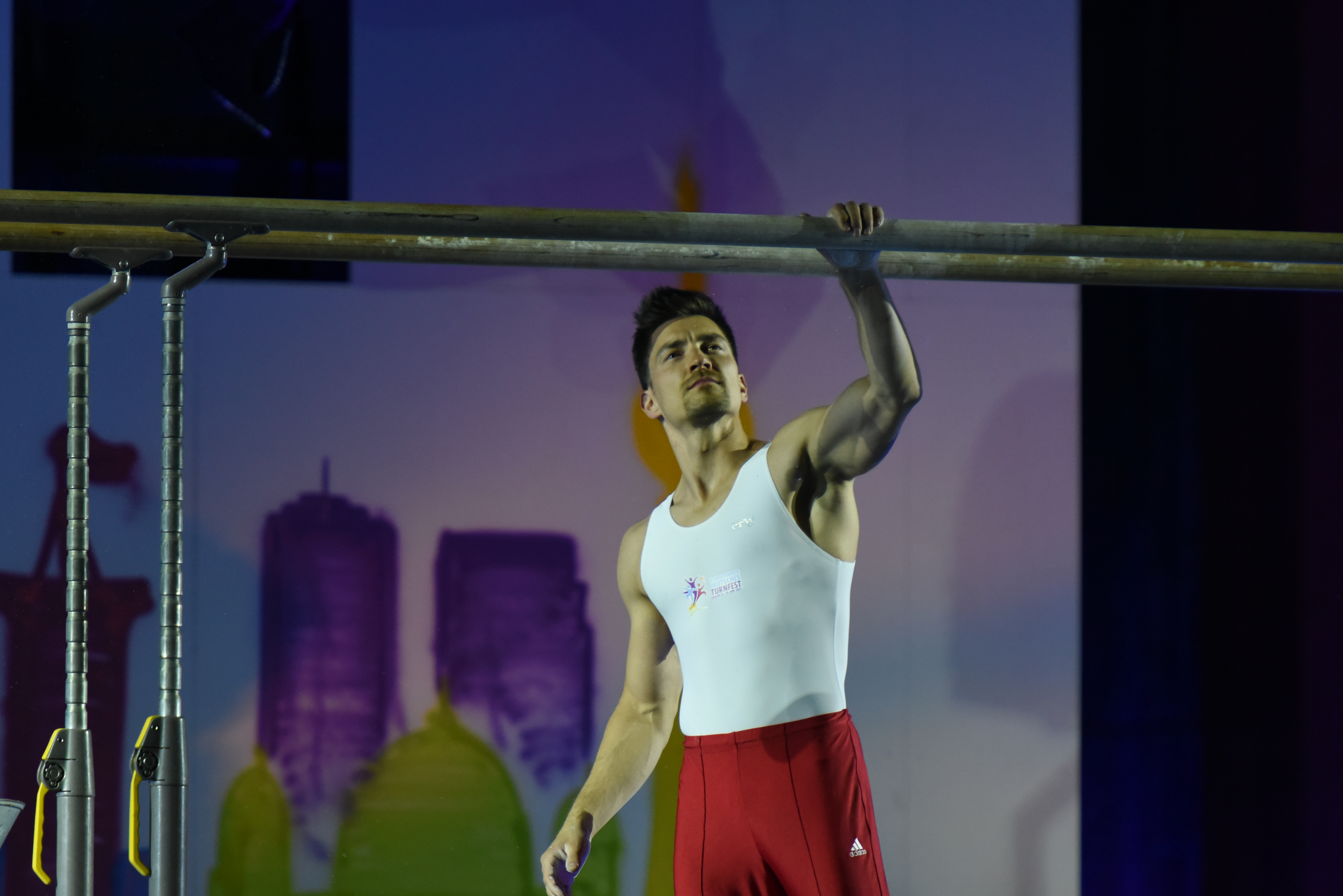 Eröffnungsfeier zum Internationalen Deutschen Turnfest Berlin 2017. Abgebildet: Philipp Boy.